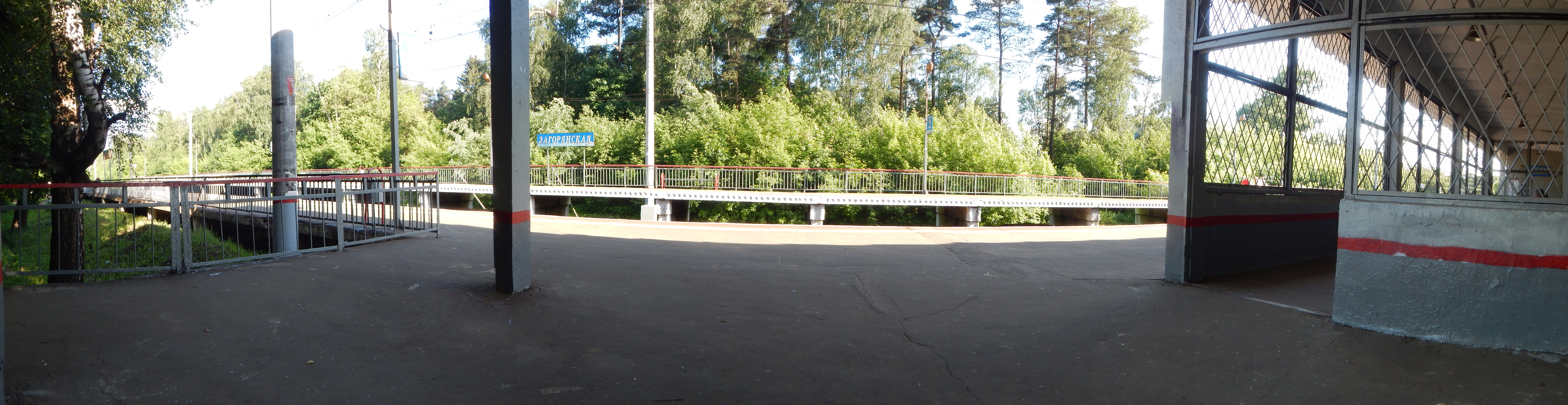 Платформа Загорянская, панорама станции рядом с билетными кассами (1 путь, платформа на Москву)